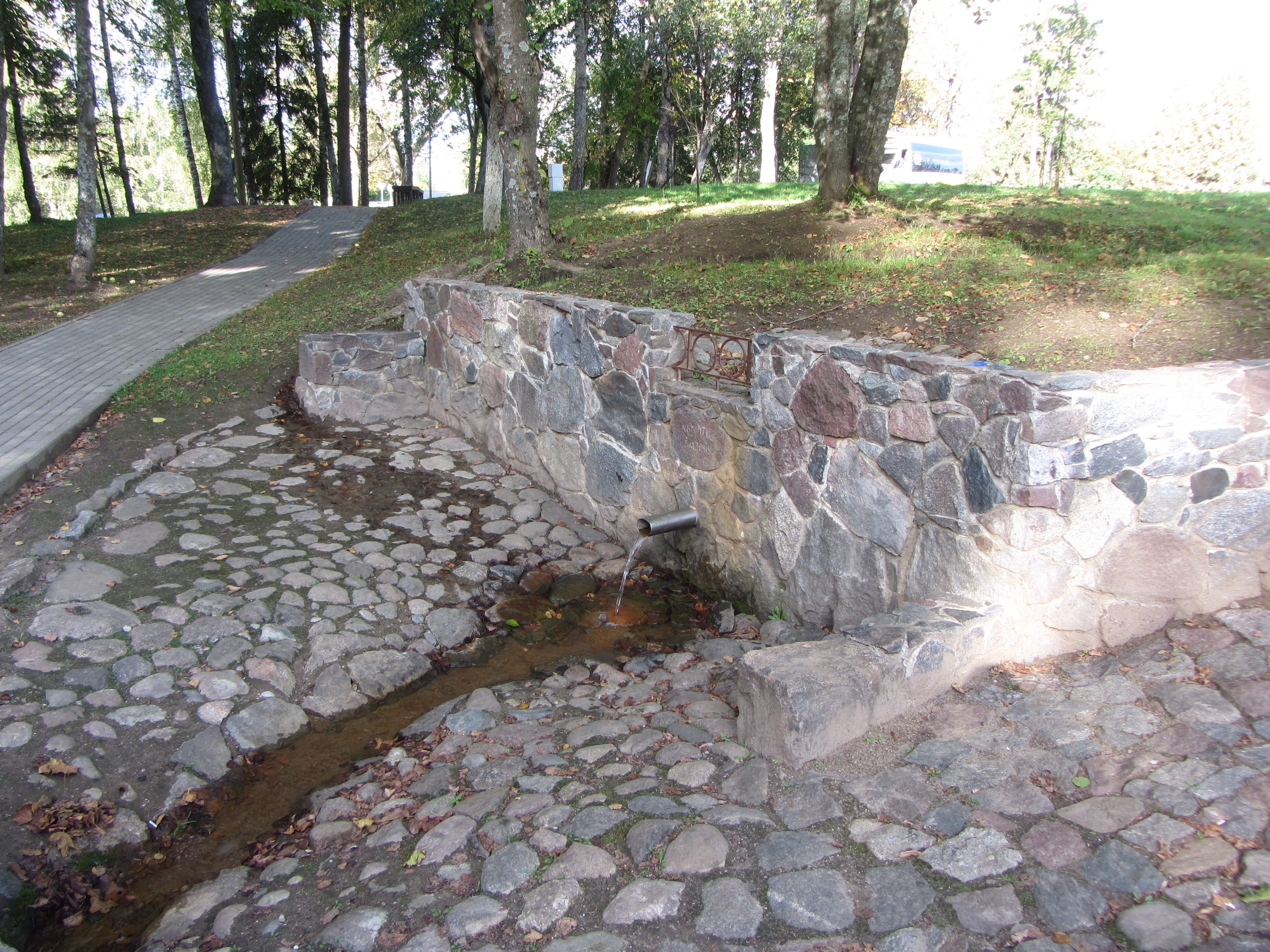 Obeliai, Lithuania